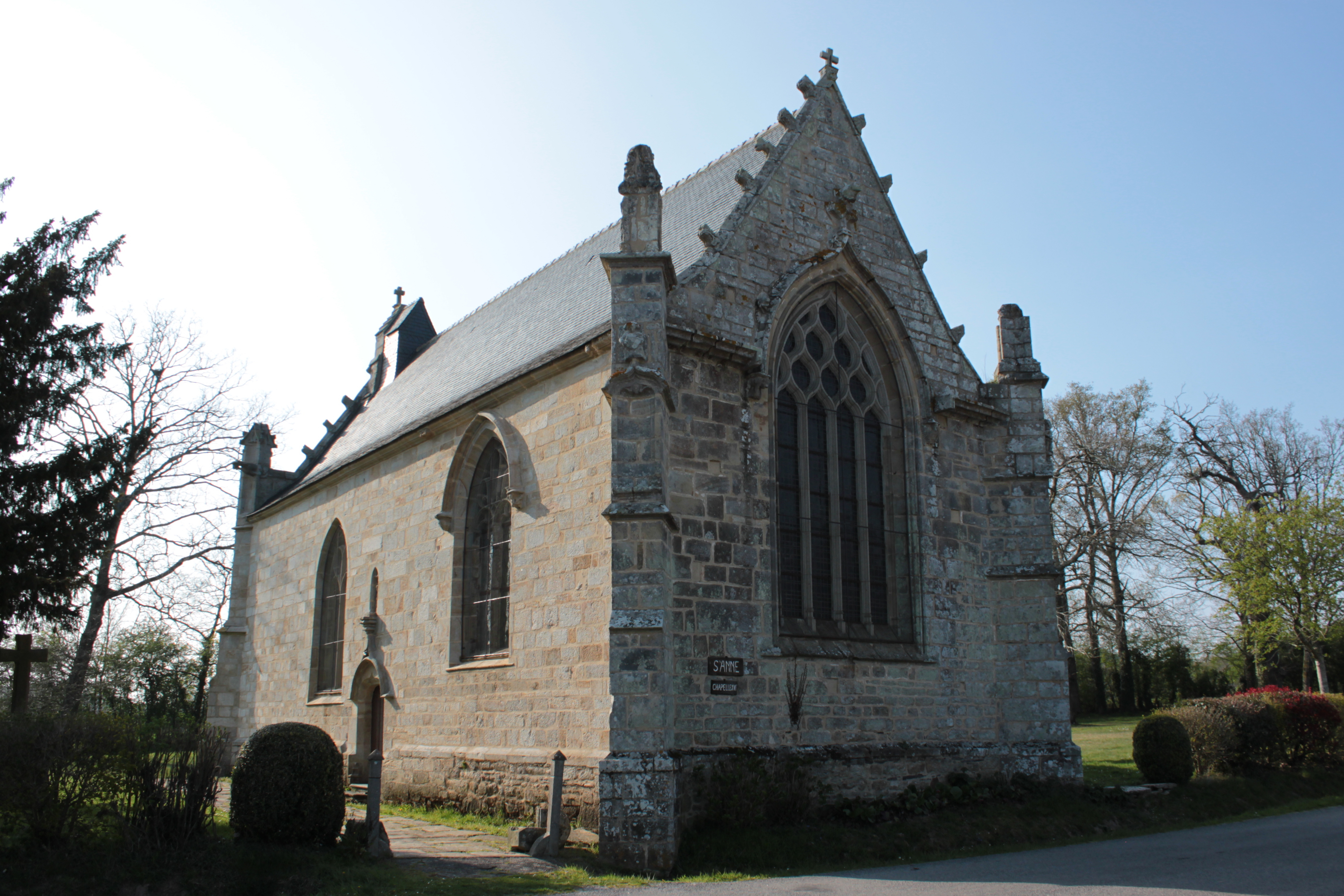 Chapelle Sainte-Anne (XVI° siècle), vue nord, Fr-56-Saint-Dolay.